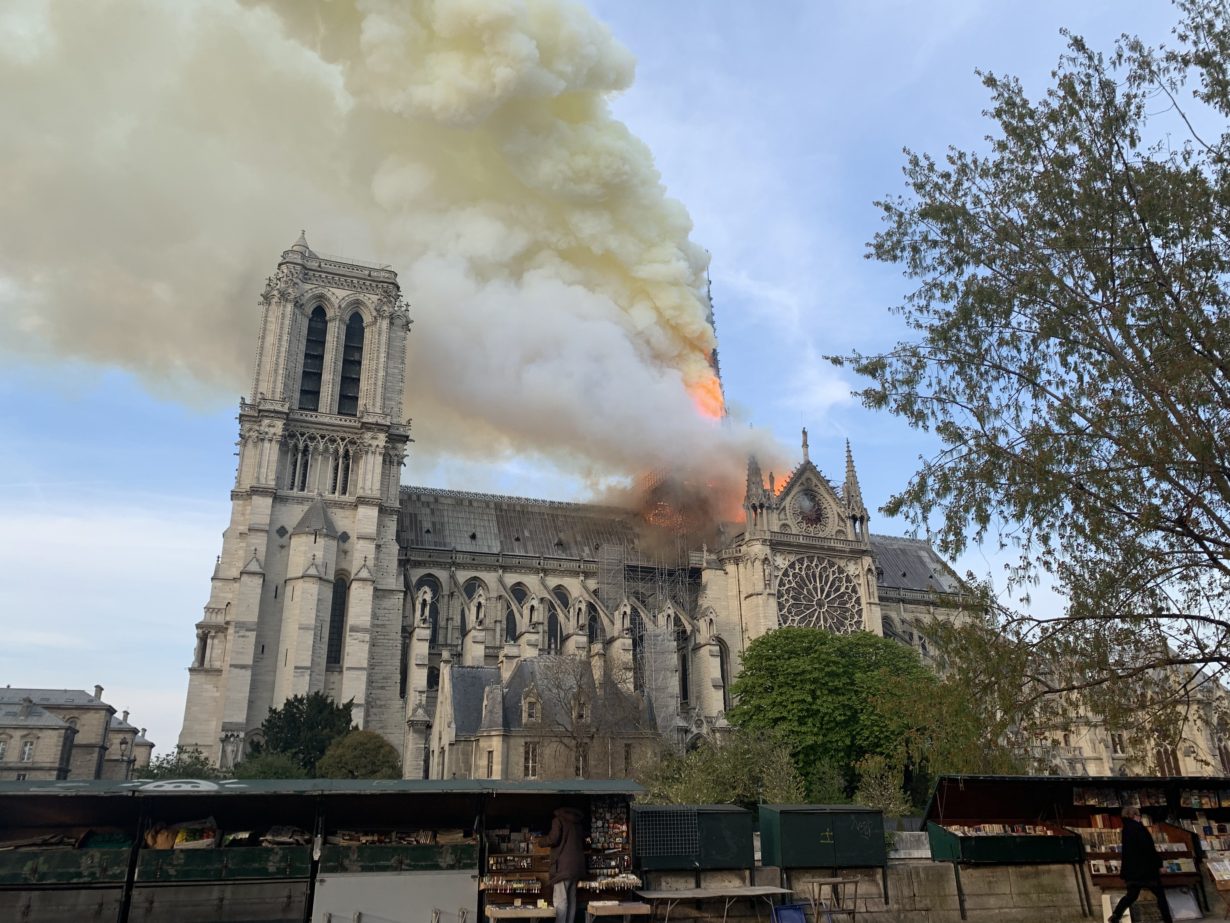 Photo de Notre-Dame de Paris le 15 avril 2019 à 19h17 prise du Quai de Montebello